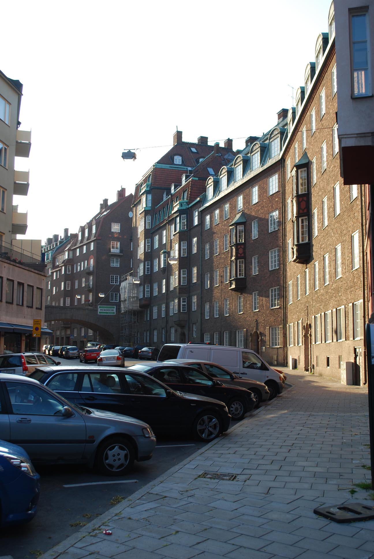 Runebergsgatan, Stockholm